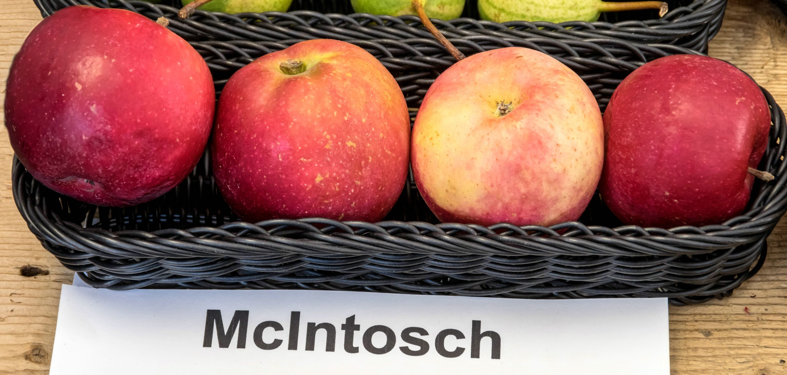 Alte Apfelsorten, von denen es im Badischen noch tragende Bäume gibt. Alle Aufnahmen au dem Oktober 2015